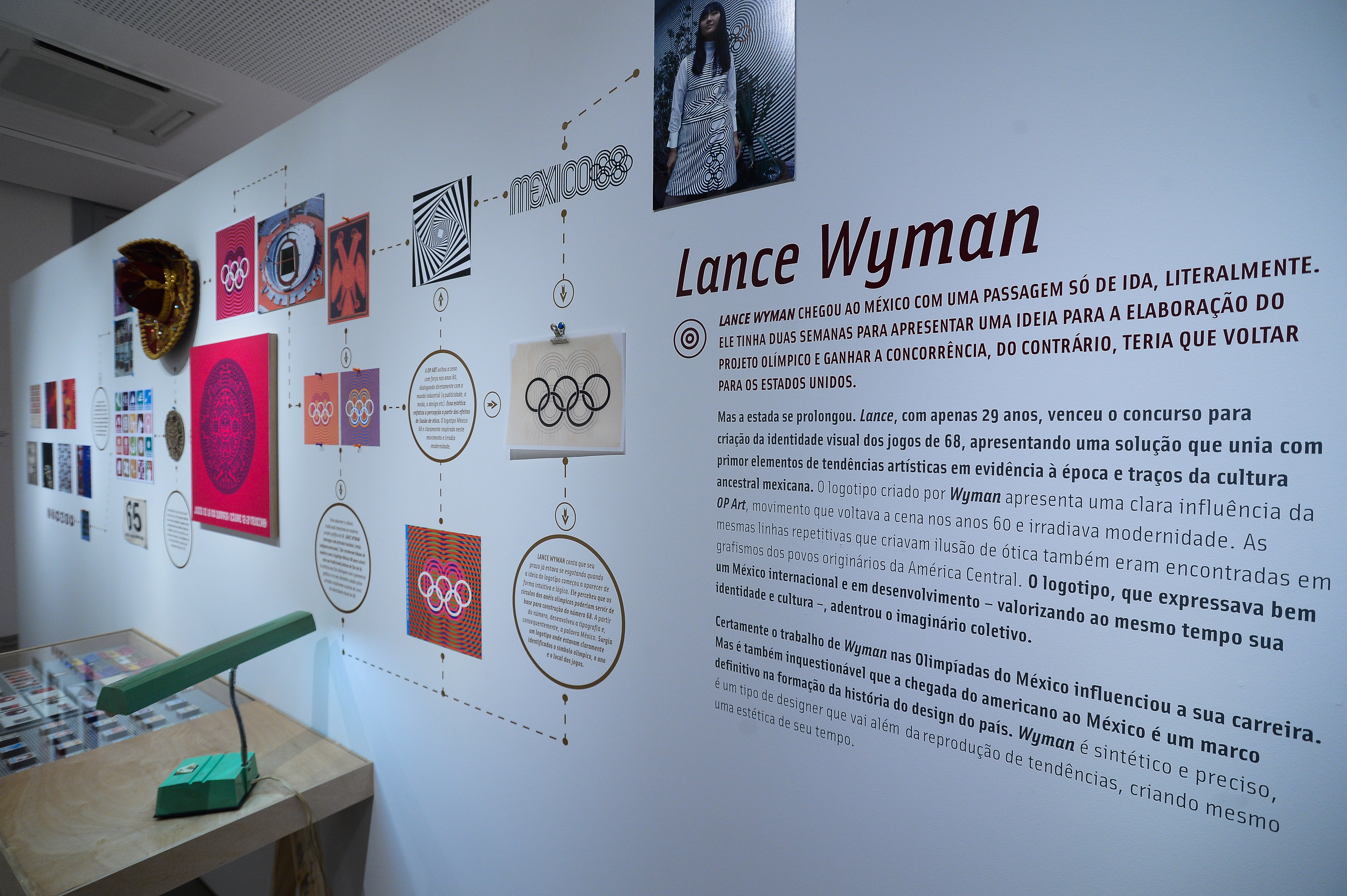 Rio de Janeiro - Exposição Design & Utopia dos Jogos, no Centro de Referência do Artesanato Brasileiro, apresenta peças de comunicação dos Jogos Olímpicos de Tókio, México, Munique, Los Angeles e Barcelona (Tomaz Silva/Agência Brasil)